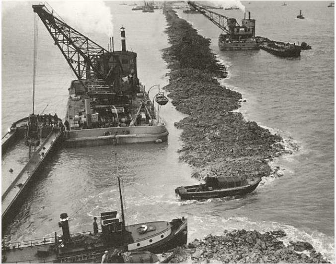 Construcción del dique 01 (Holanda)